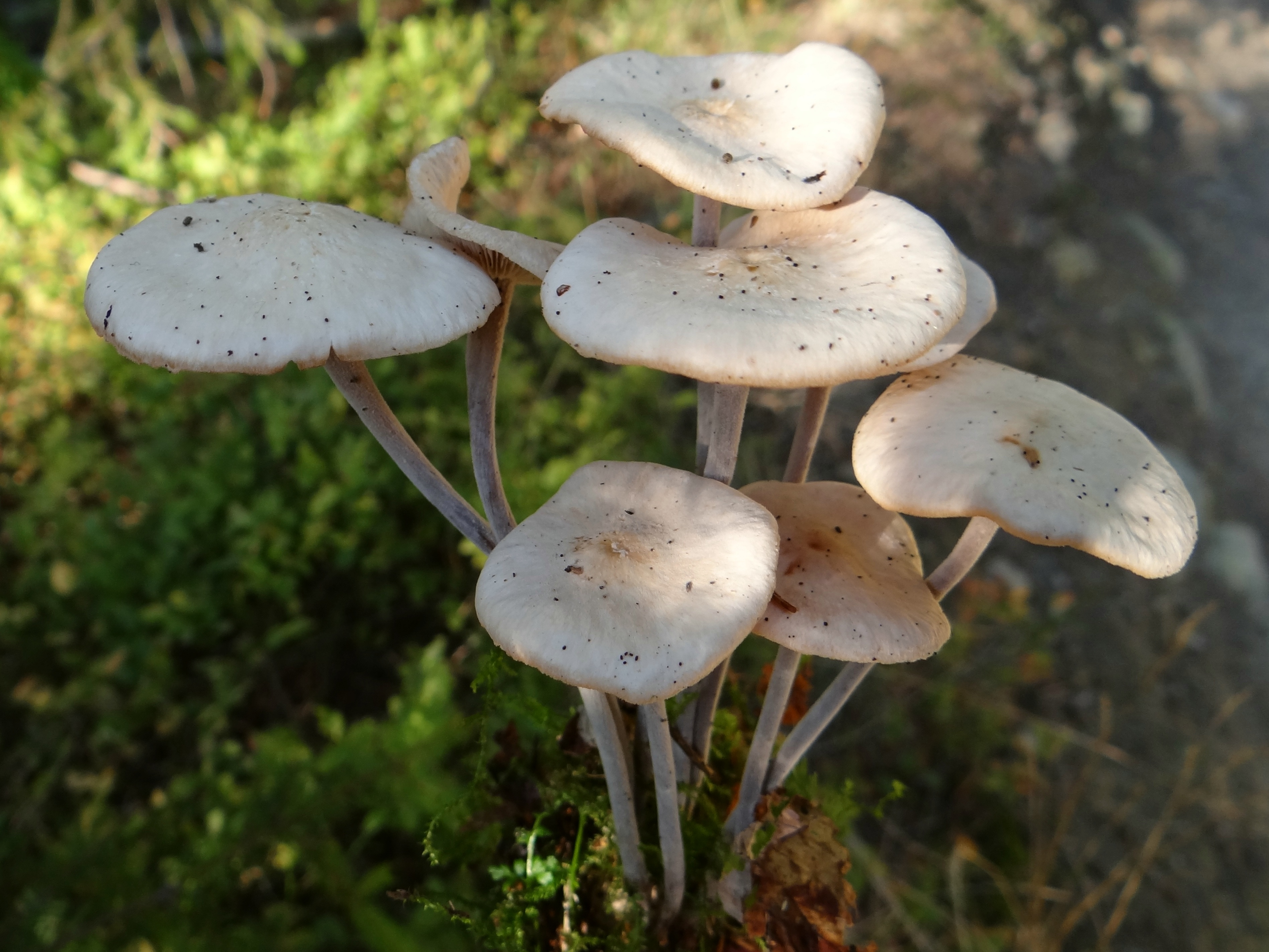 Gymnopus confluens